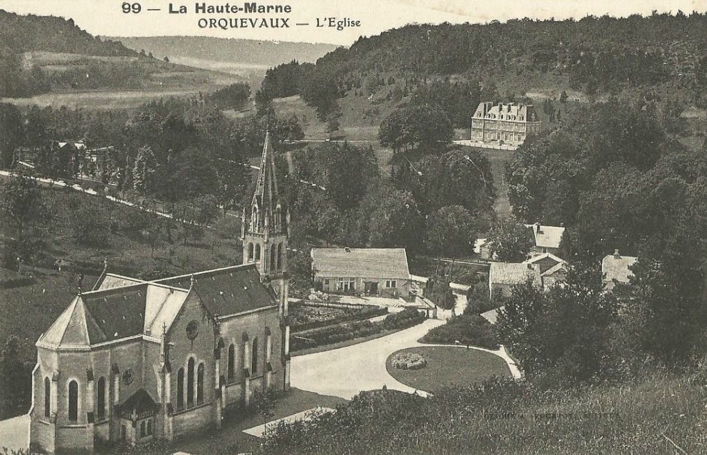 Carte postale: panorama du village